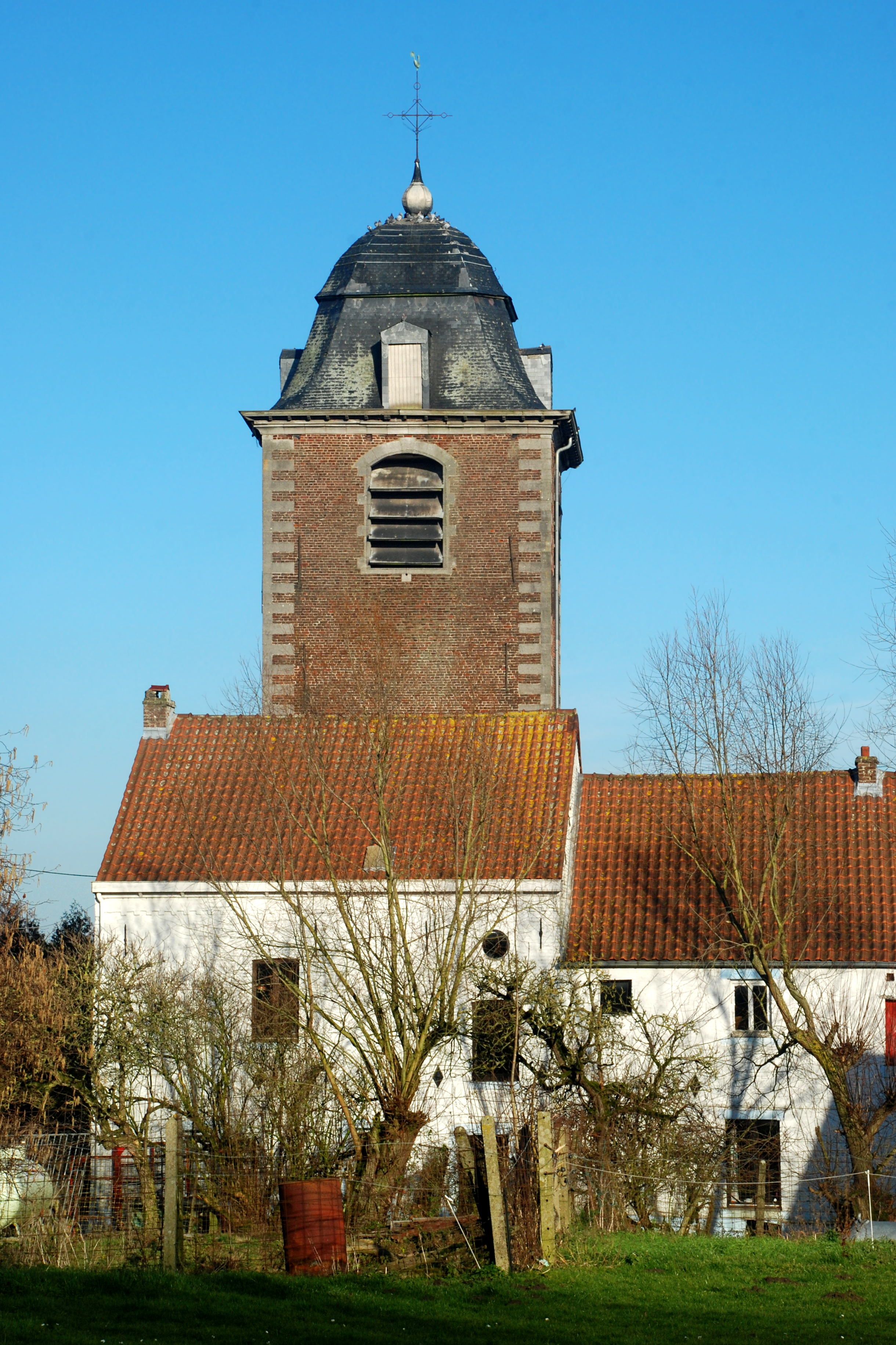 Belgique - Brabant wallon - Genappe - Baisy-Thy - Église Saint-Hubert